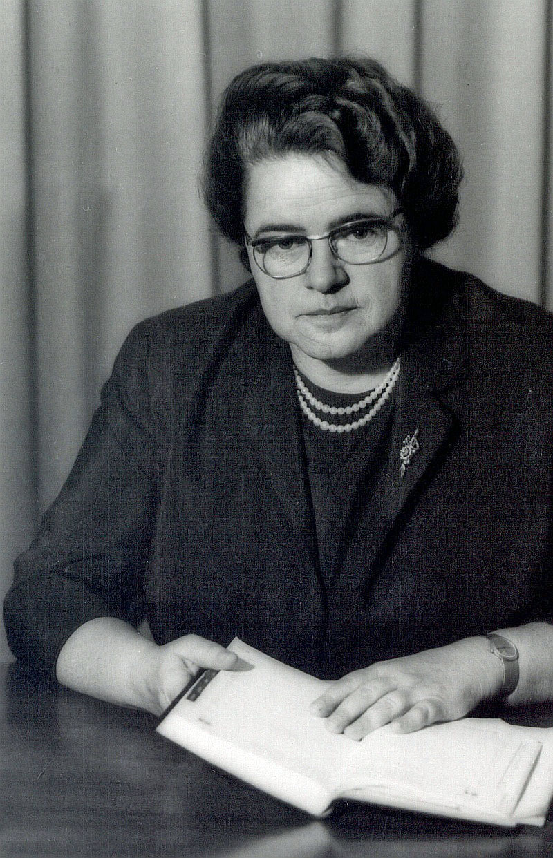 Ellen Wiederhold (* 21. November 1921 in Hilden; † 4. September 1995), Bürgermeisterin der Stadt Hilden (1969–1994), Anfang 1960